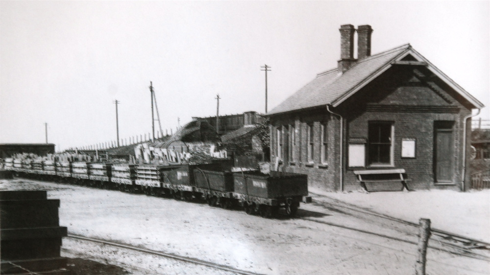 Tywyn Wharf Station on the Talyllyn Railway in 1905